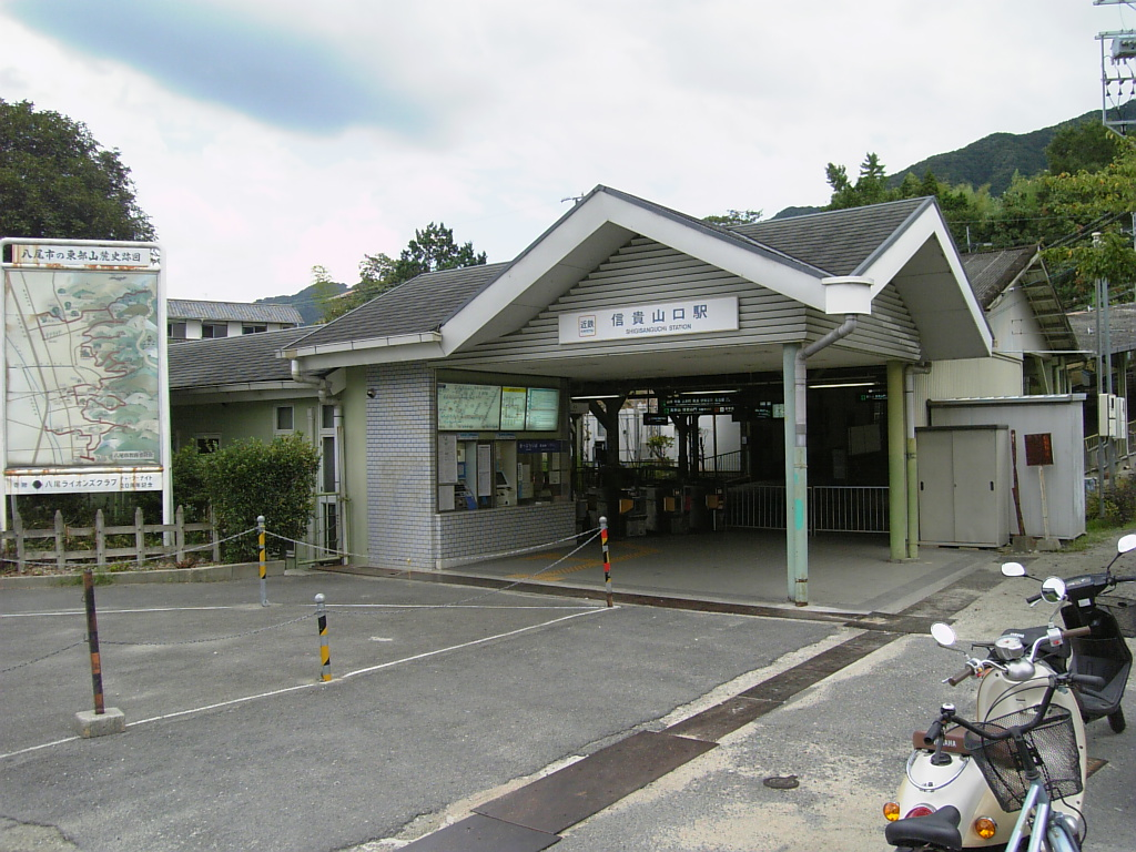 信貴山口駅